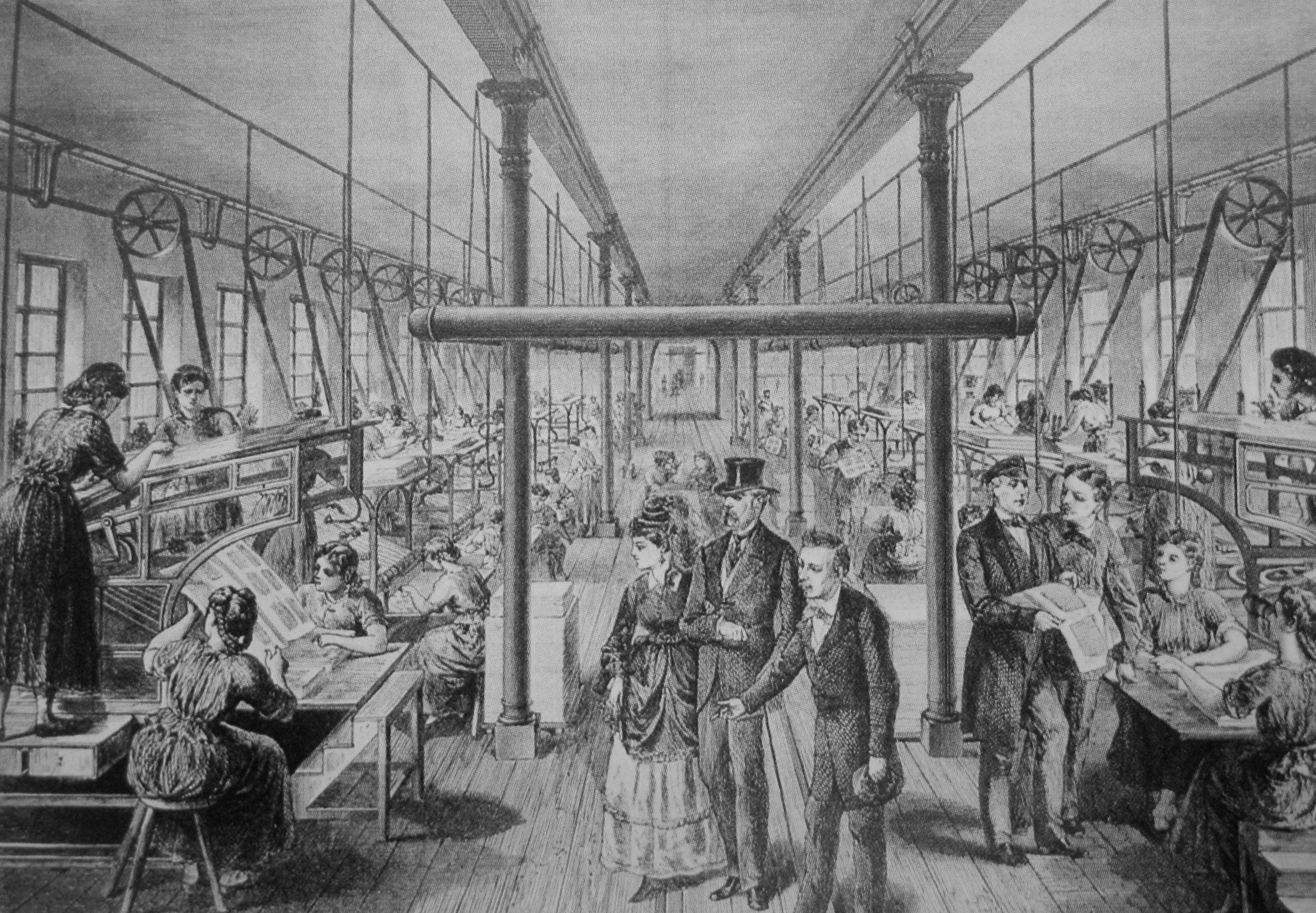 Eduard und Milly Brockhaus besuchen den Maschinensaal der Druckerei, 1870